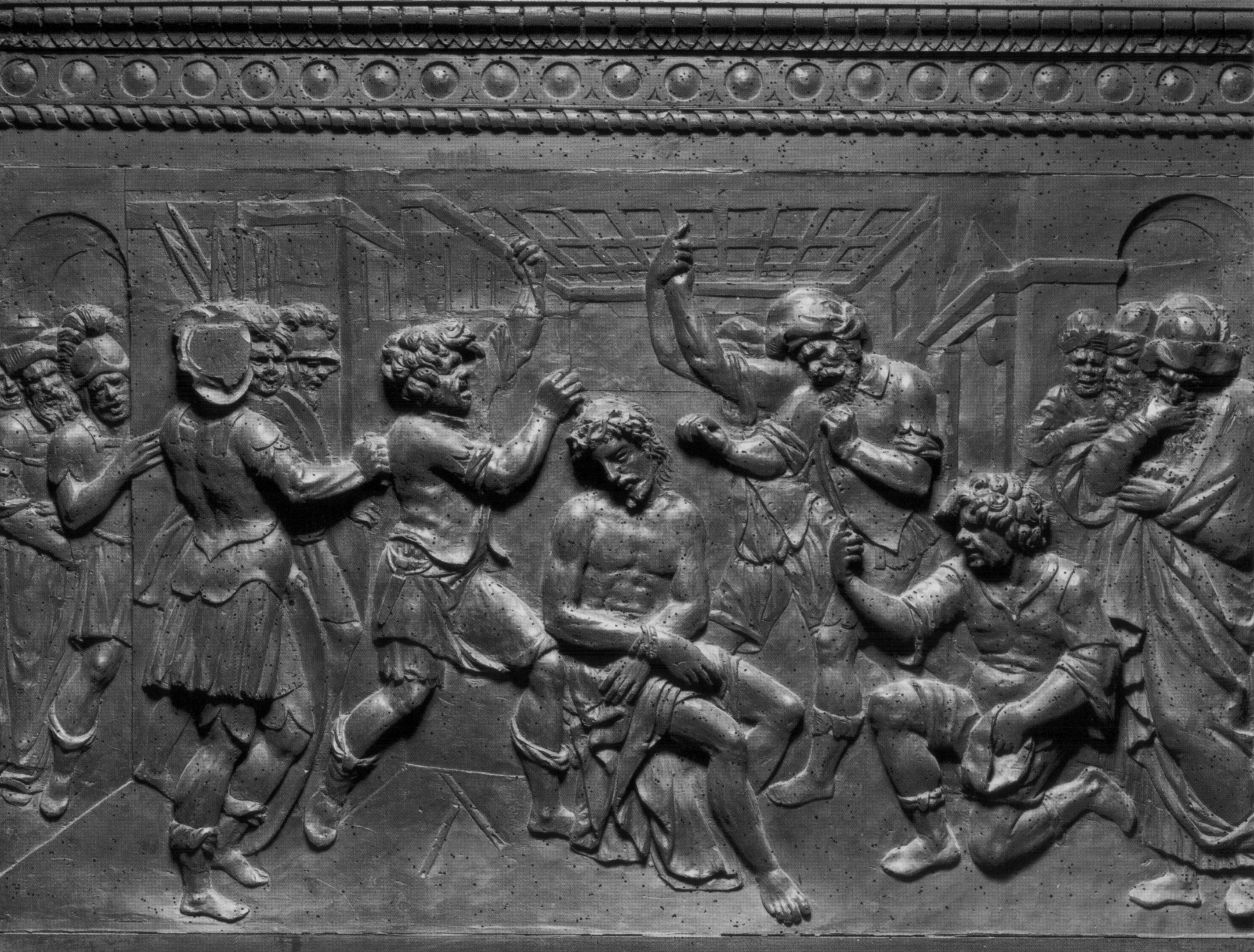 Il Pulpito della Resurrezione, in San Lorenzo a Firenze, opera di Donatello (1460s). Dettaglio: Cristo deriso, pannello aggiunto nel XVII secolo. - Fotografia Alinari, 1852.